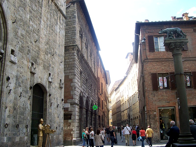 Siena - Via Banchi di Sopra